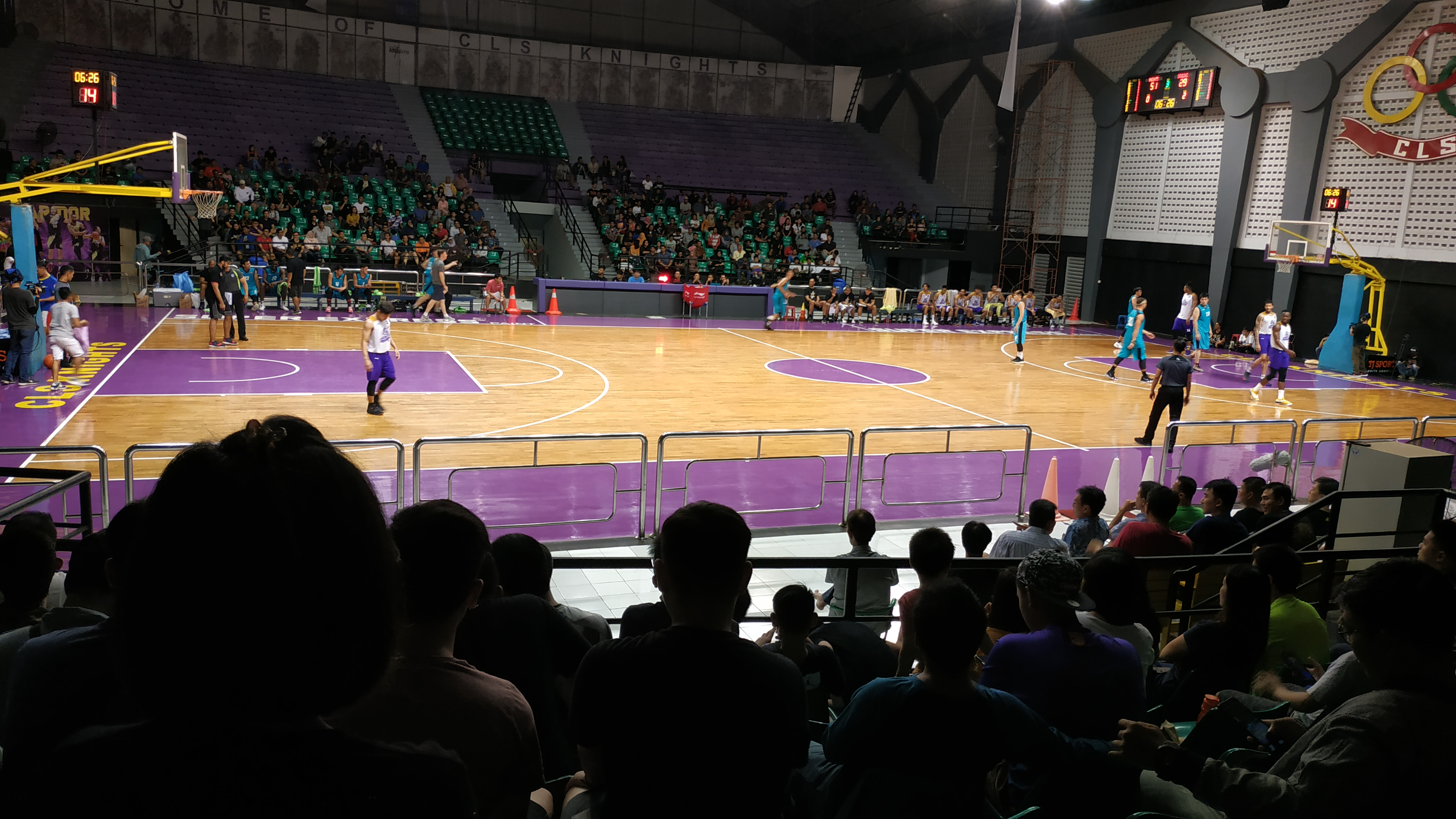 GOR CLS Knight 2018-11-09